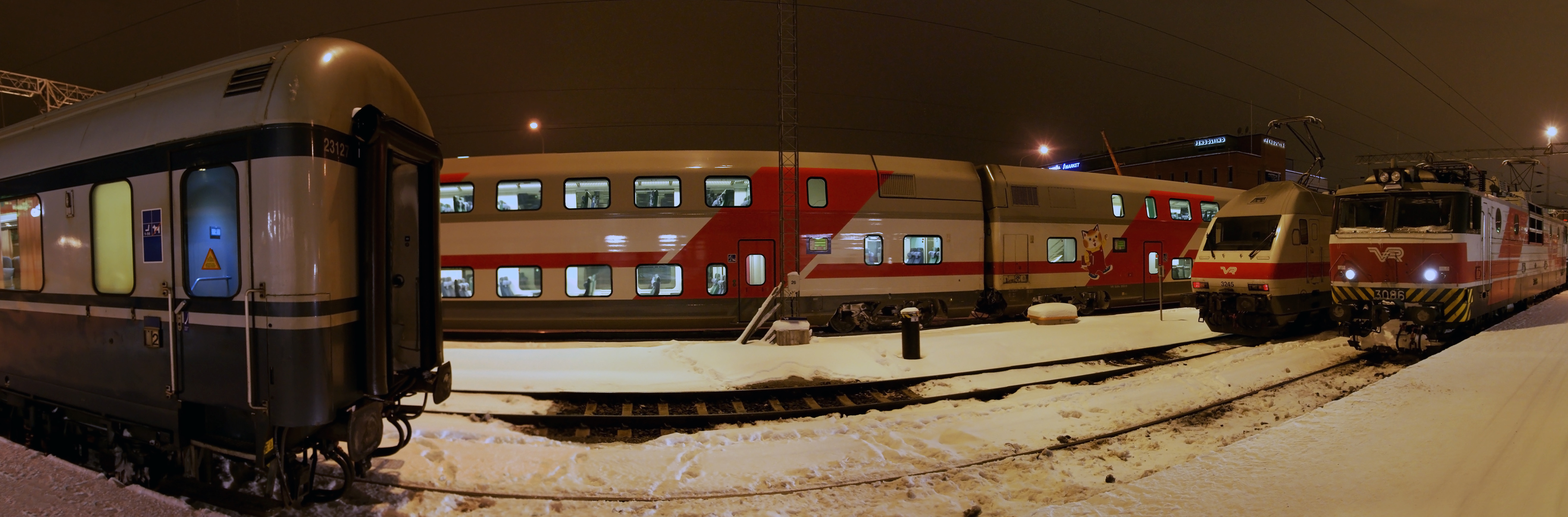 Junia Tampereen rautatieaseman ratapihalla.